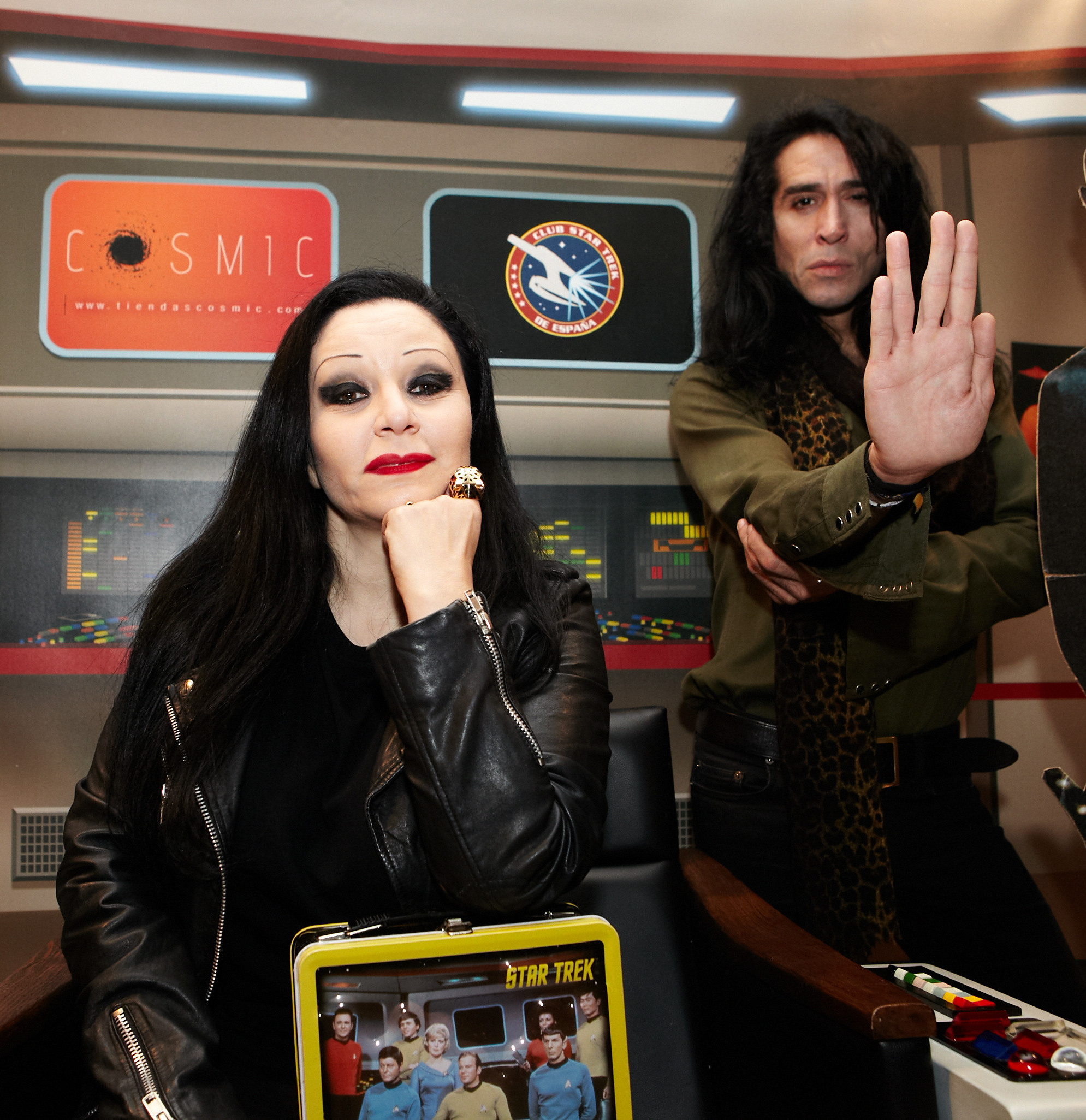 Argazkia / Fotografía: Floro Azqueta